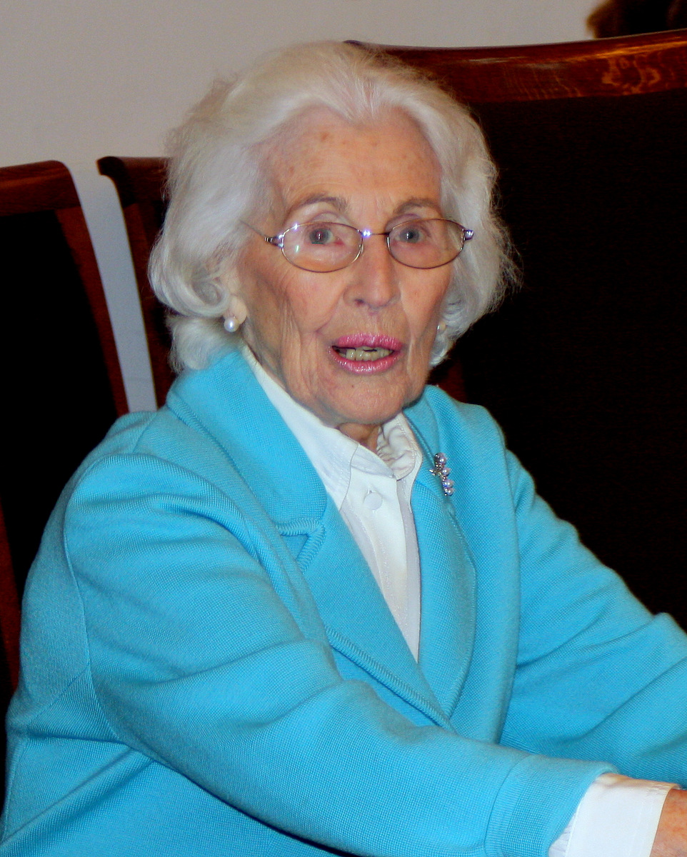 Hildegard Hamm-Brücher, geb. Brücher war eine deutsche Politikerin (FDP). Das Bild zeigt sie am 14.10.2010 bei einem Besuch des Sozialausschusses des Münchner Stadtrats im Münchner Rathaus (Großer Sitzungssaal).